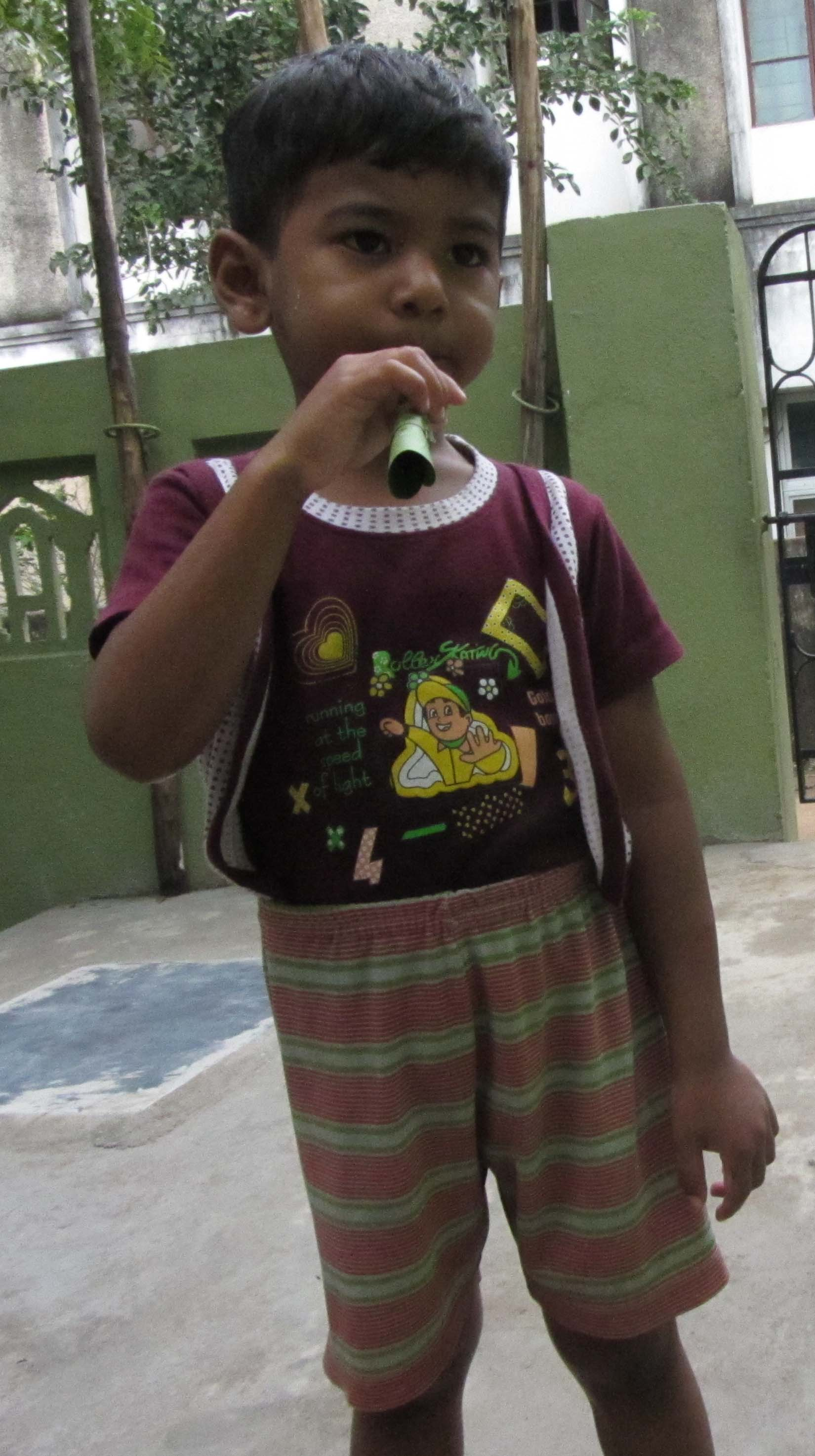 பூவரச இலையில் ஊதல் செய்து ஊதிச் சிறுவர் விளையாடுவர். தமிழர் நாட்டுப்புற விளைட்டு. Own shot. A whistle made with Portia leaf.